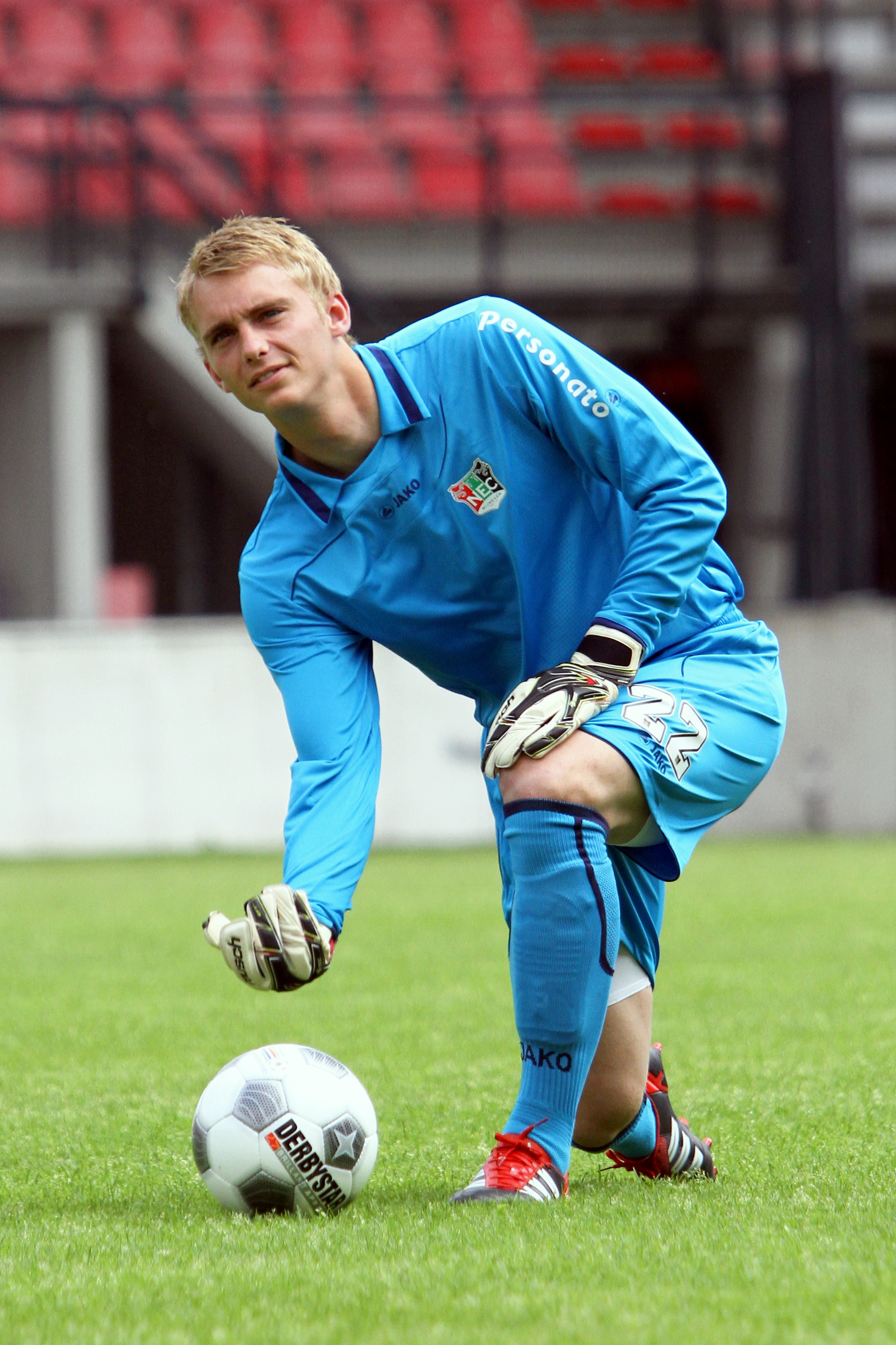 Jasper Cillessen - keeper van NEC